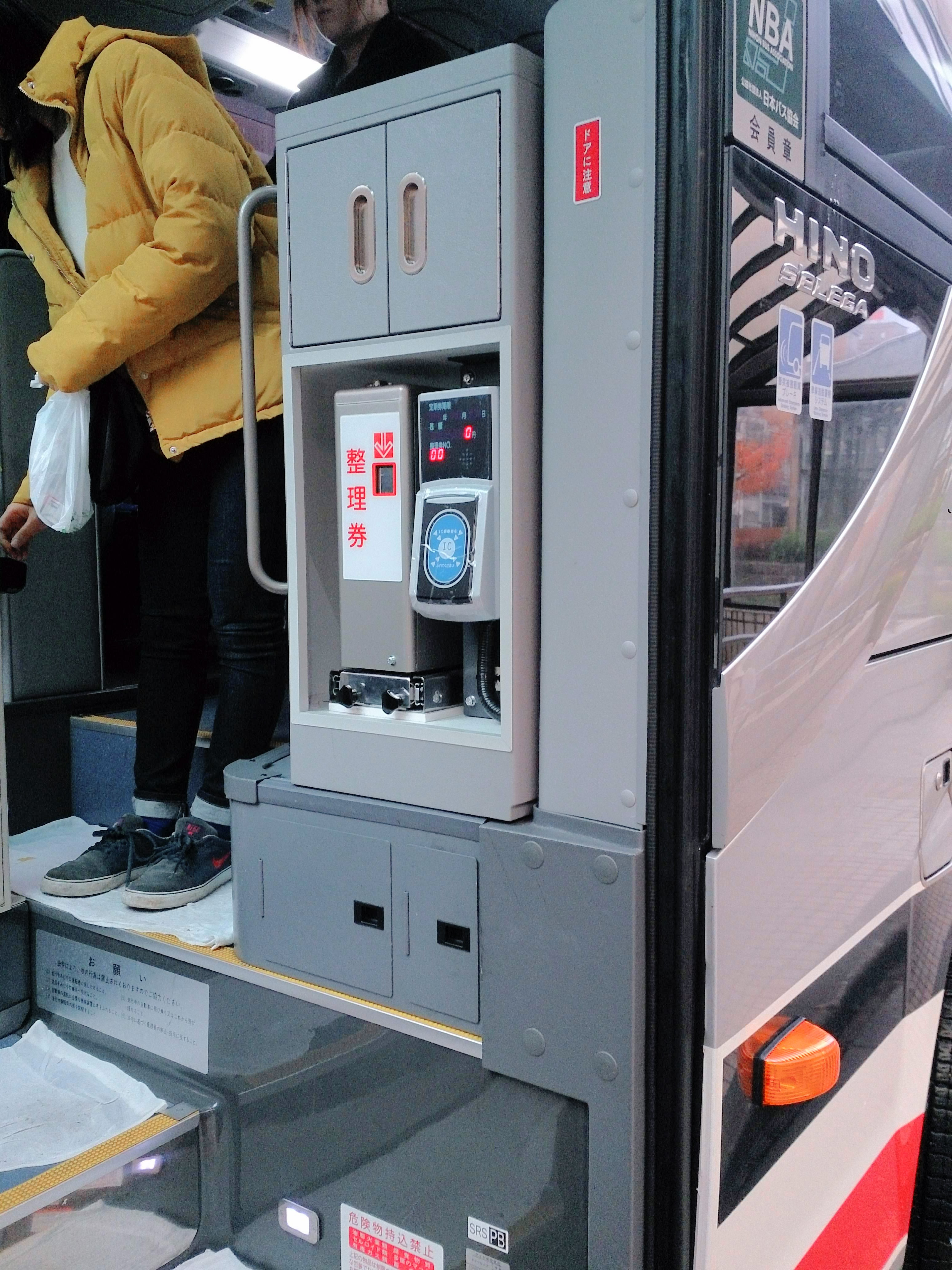 越後交通の高速バスに設置されたiCカードリーダー